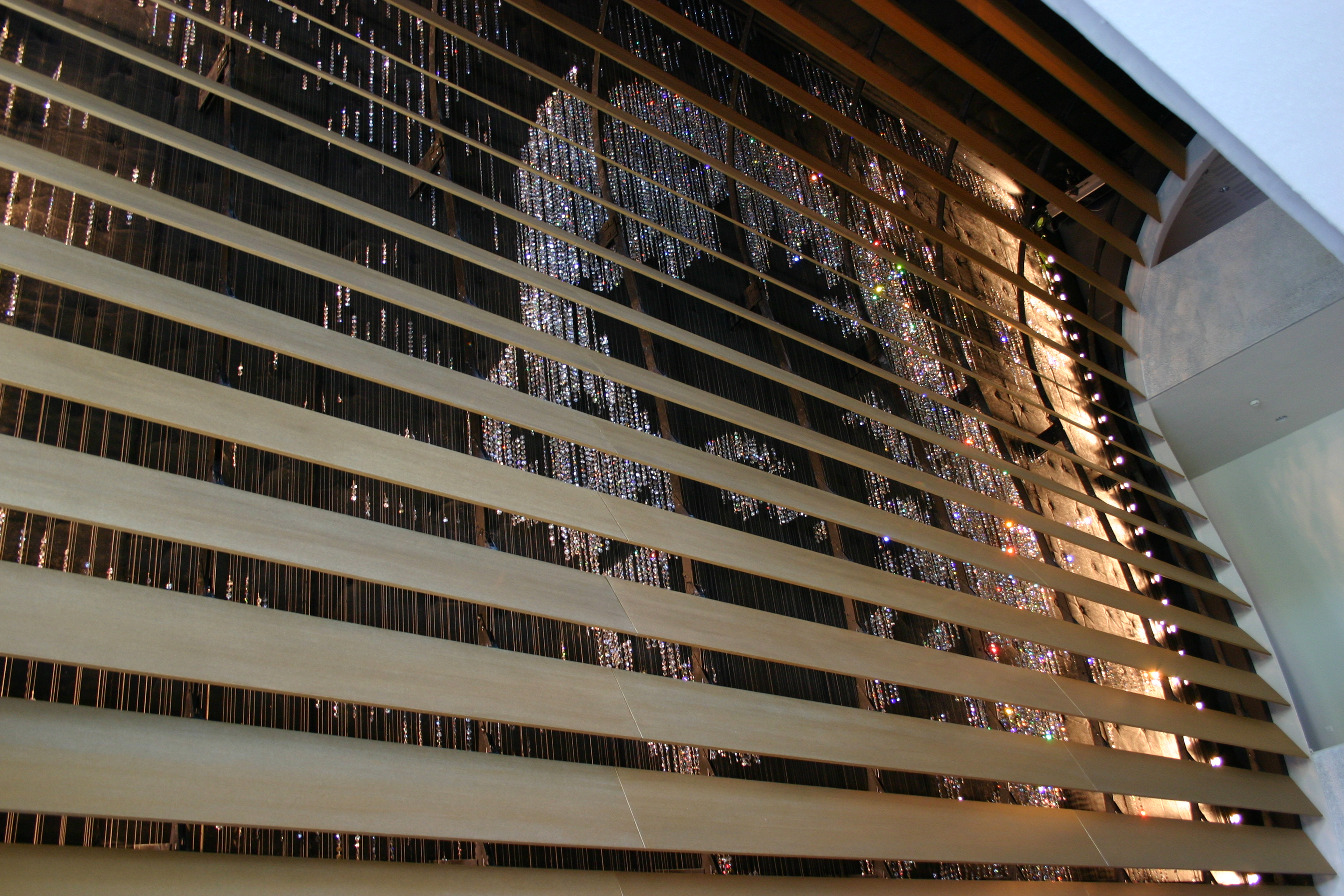 Goldene Wand im kleinen Festspielhaus, Salzburg